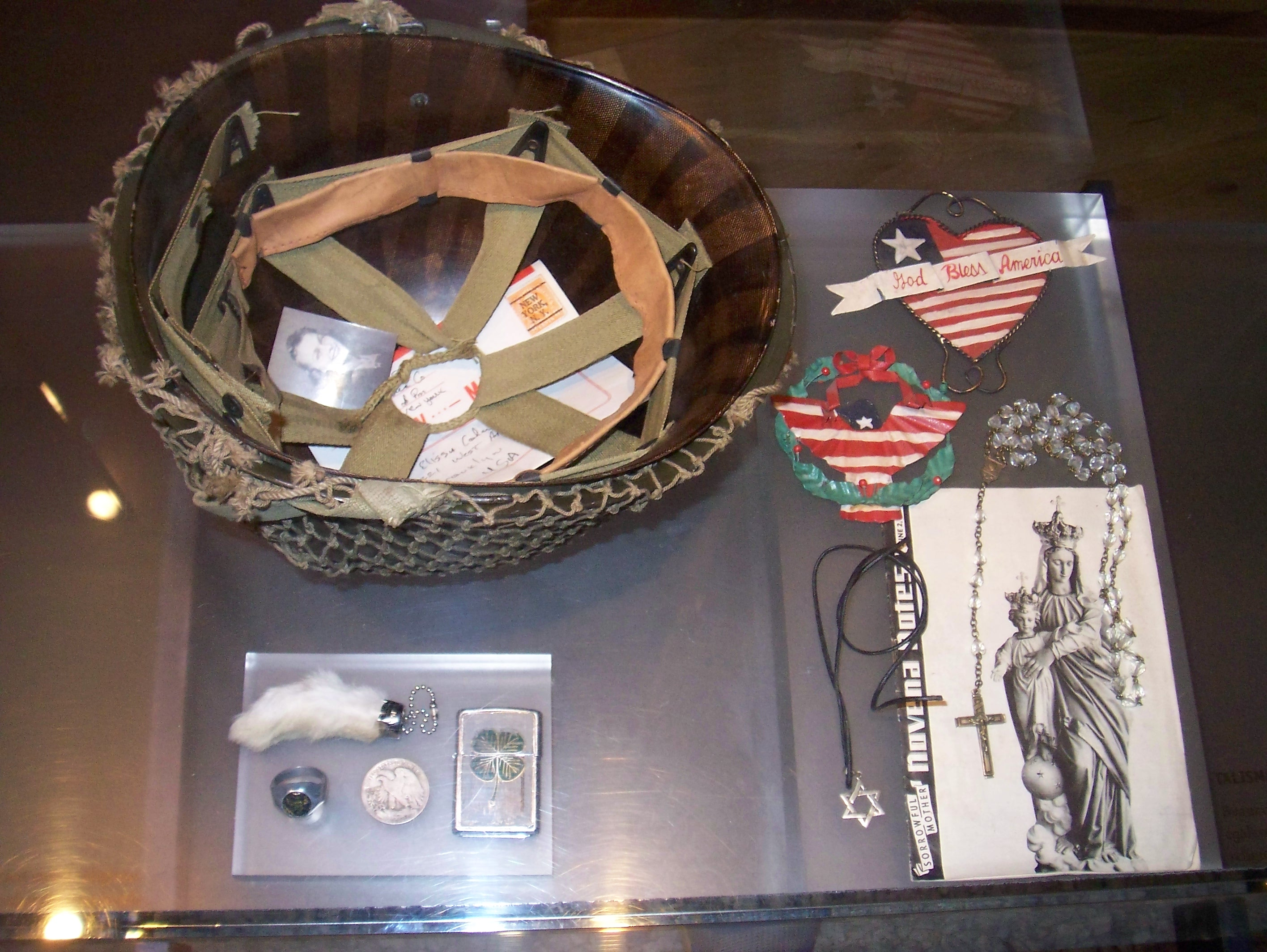 Visitor Center - Effet personnels - Cimetière Américain de Colleville-sur-Mer - France